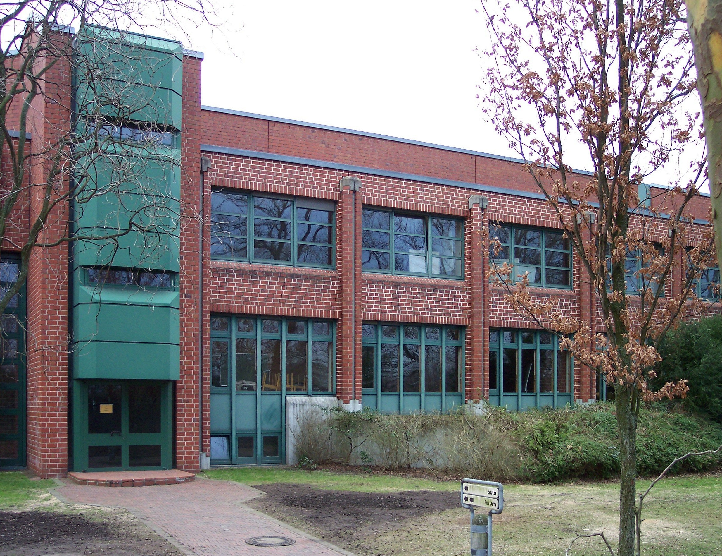 Polizeiführungsakademie Münster